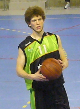 Le joueur français de basket-ball Antoine Eito (ASVEL, à Agde, 34)